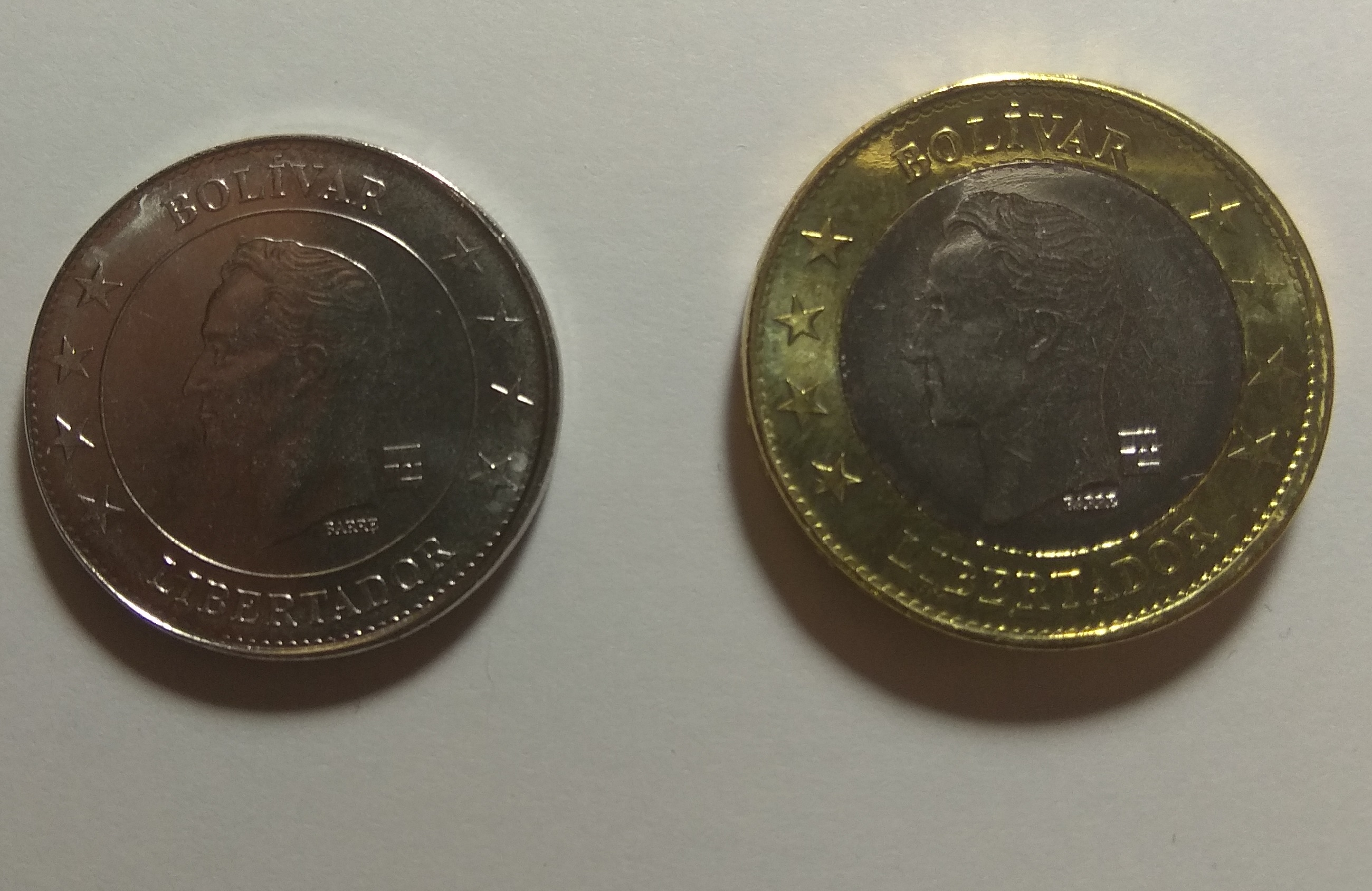 Reverse of 50 centimos and 1 Bolivar coins